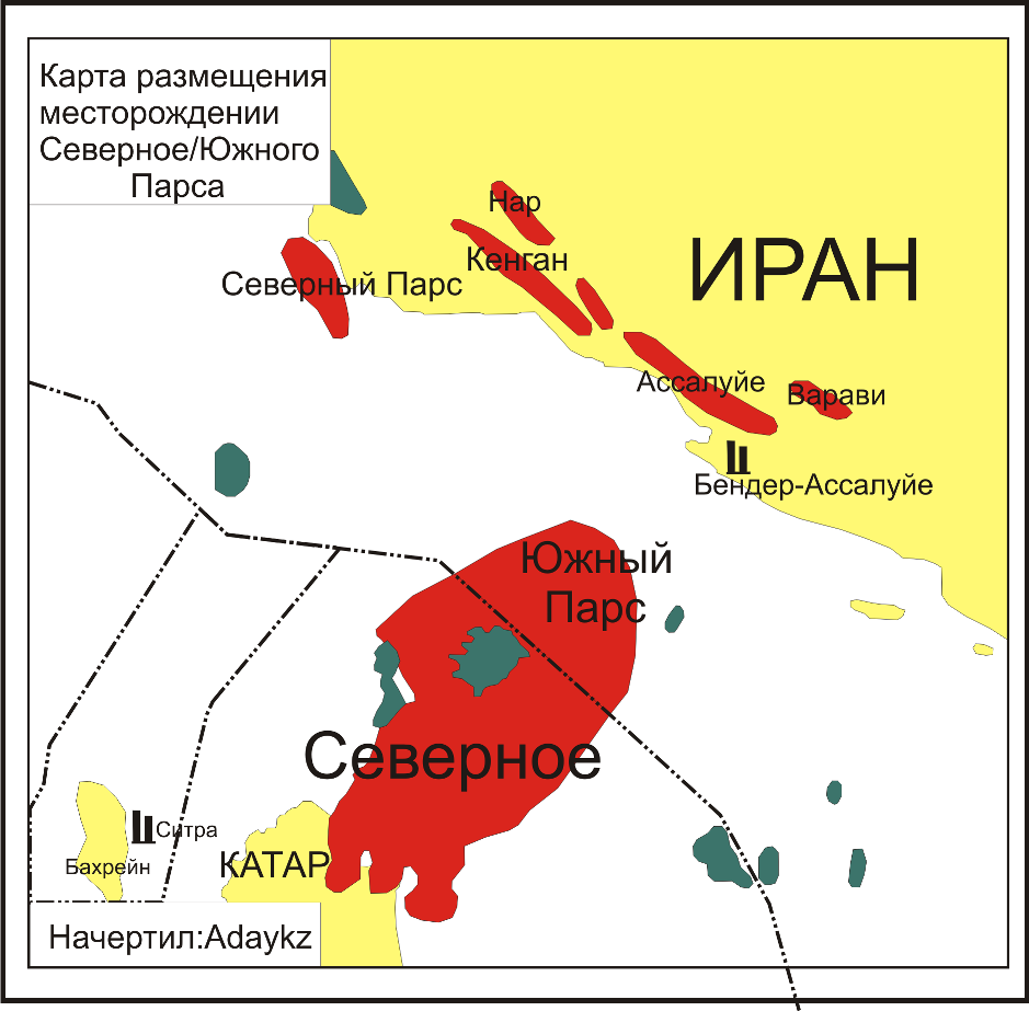 Карта размещения Северного Купола/Южного Парса